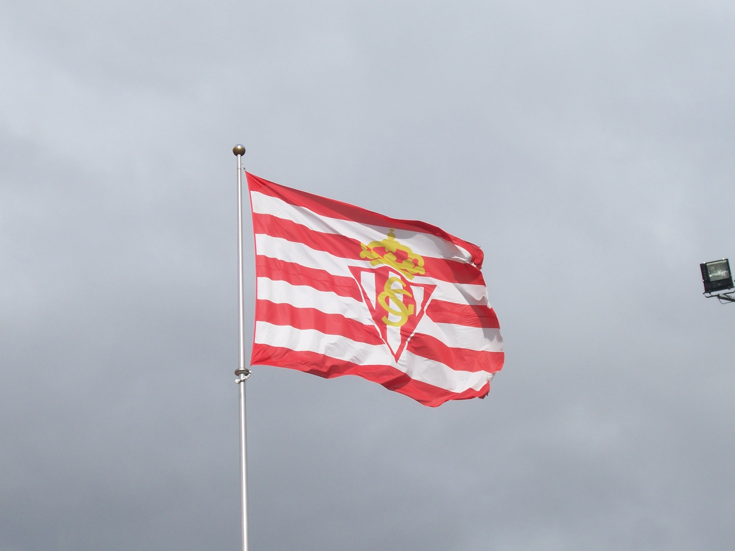 Bandera del Real Sporting ondeando en su sede social de Mareo